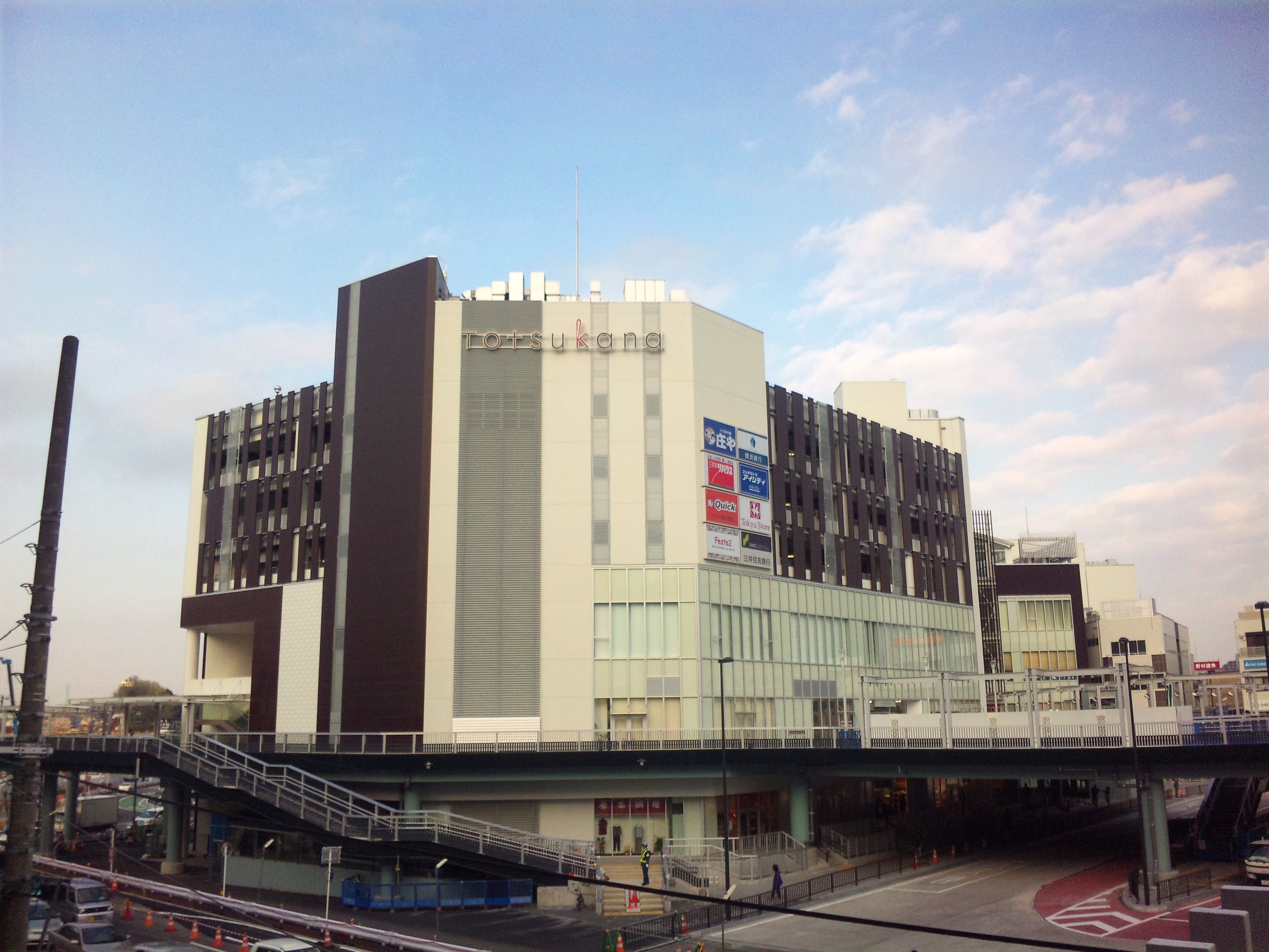 トツカーナの全景です。